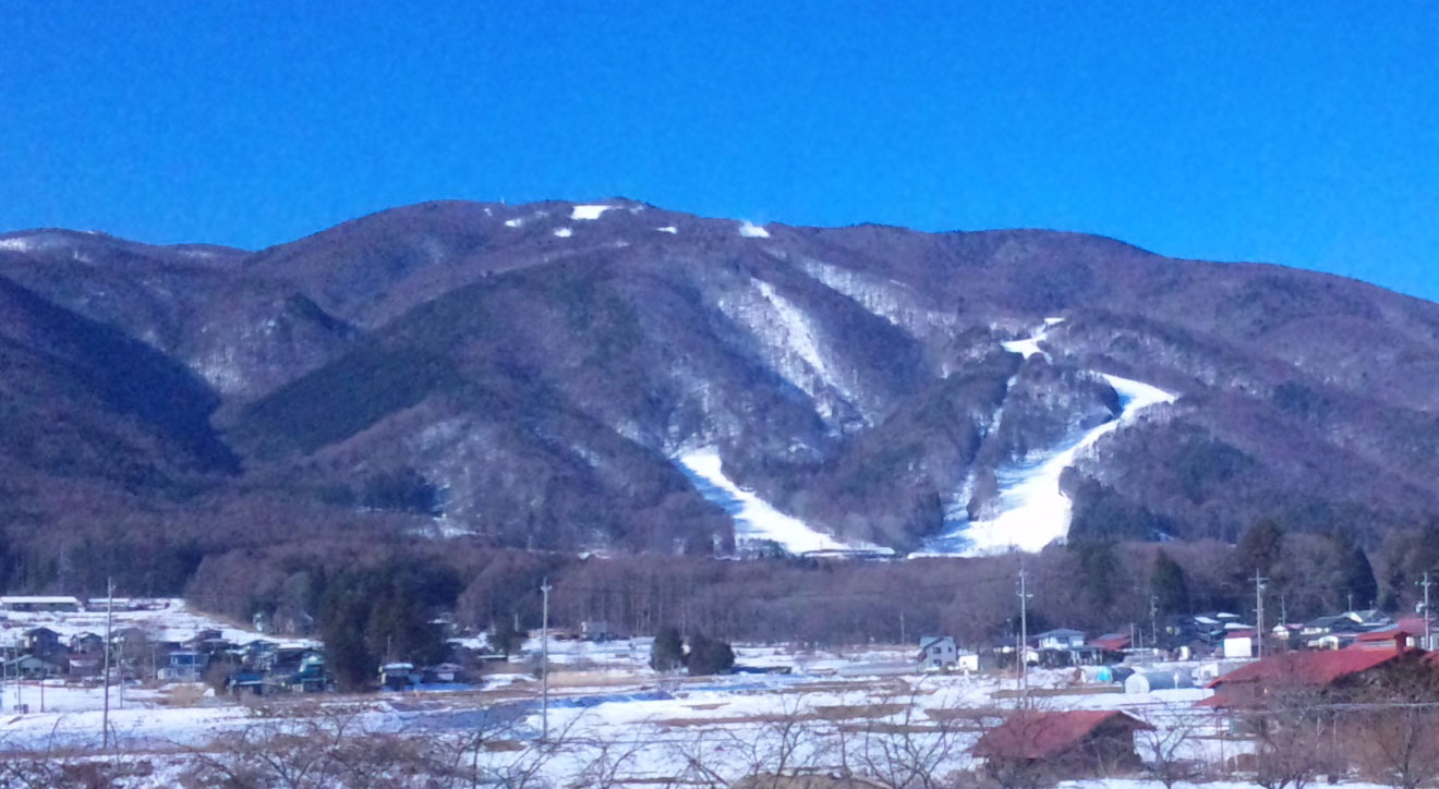 富士見パノラマスキー場と入笠山、 私の携帯電話ドコモSH-01Bにて撮影